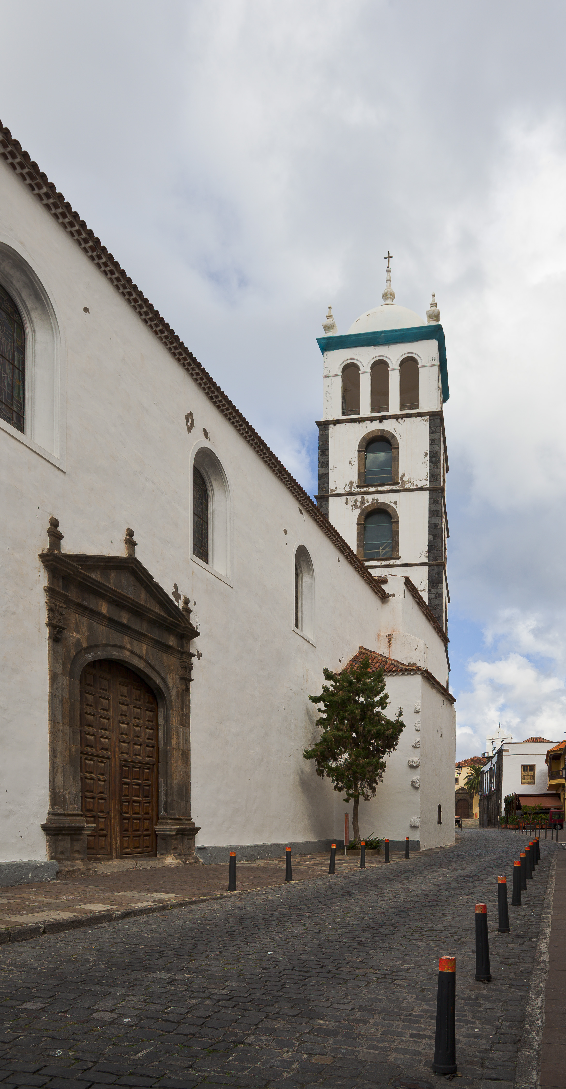 Iglesia de Santa Ana, Garachico, Tenerife, España